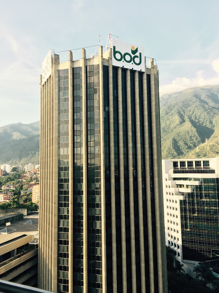 Torre principal del B.O.D. en Caracas, Venezuela